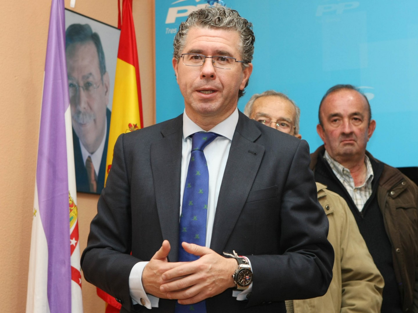 Francisco Granados en Tres Cantos,12 de enero 2011